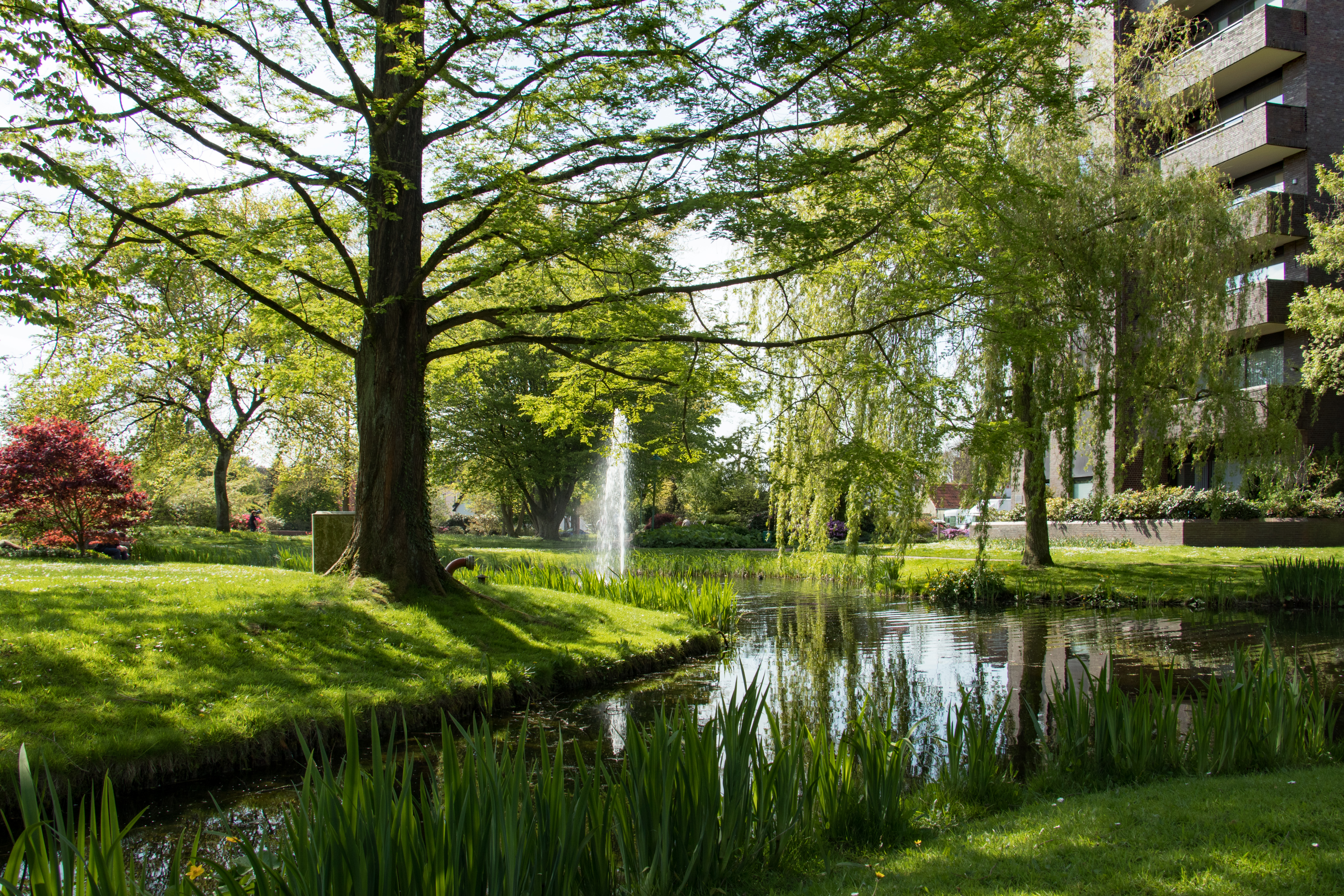 Stadtpark Westerstede